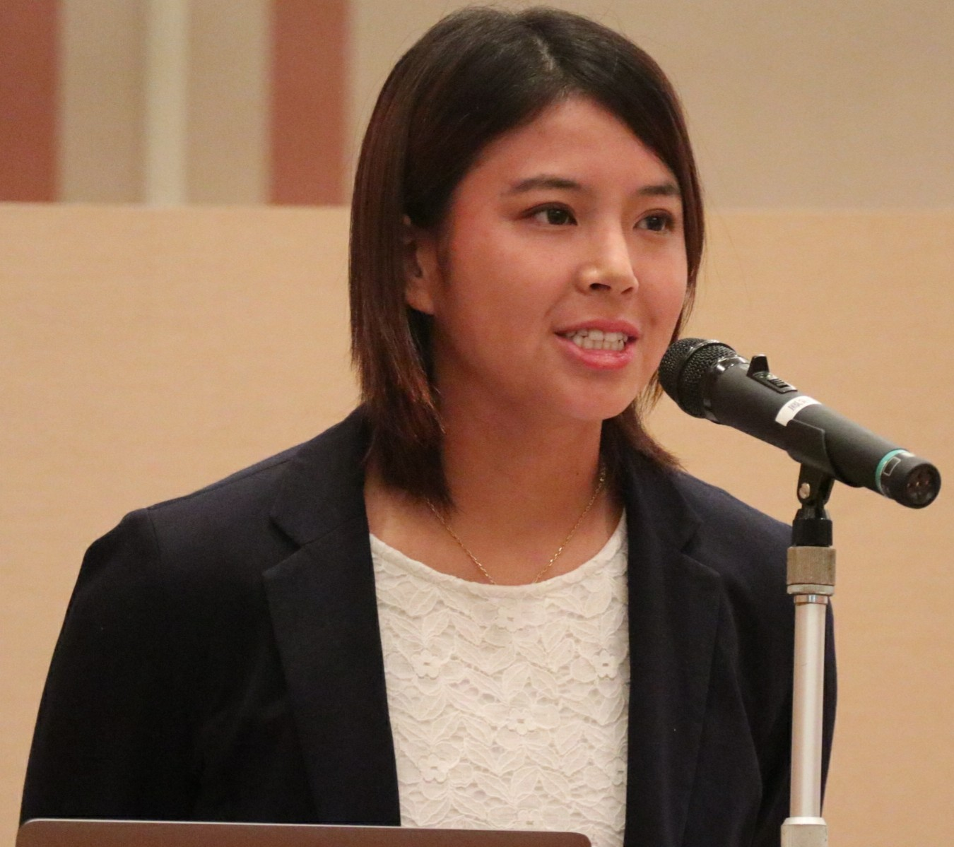 女子野球選手